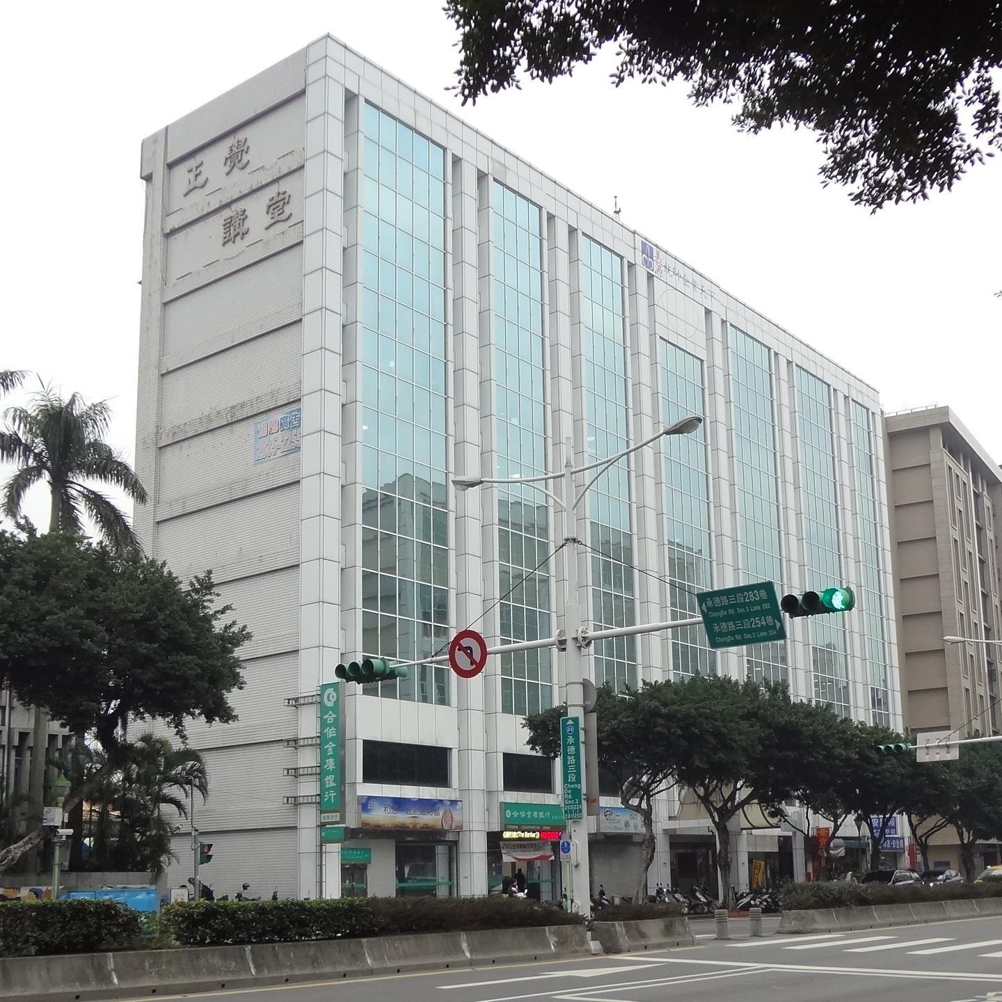 臺北市大同區承德路三段「美源統帥企業天下辦公大樓」前方外觀，左下角為合作金庫銀行民族分行。